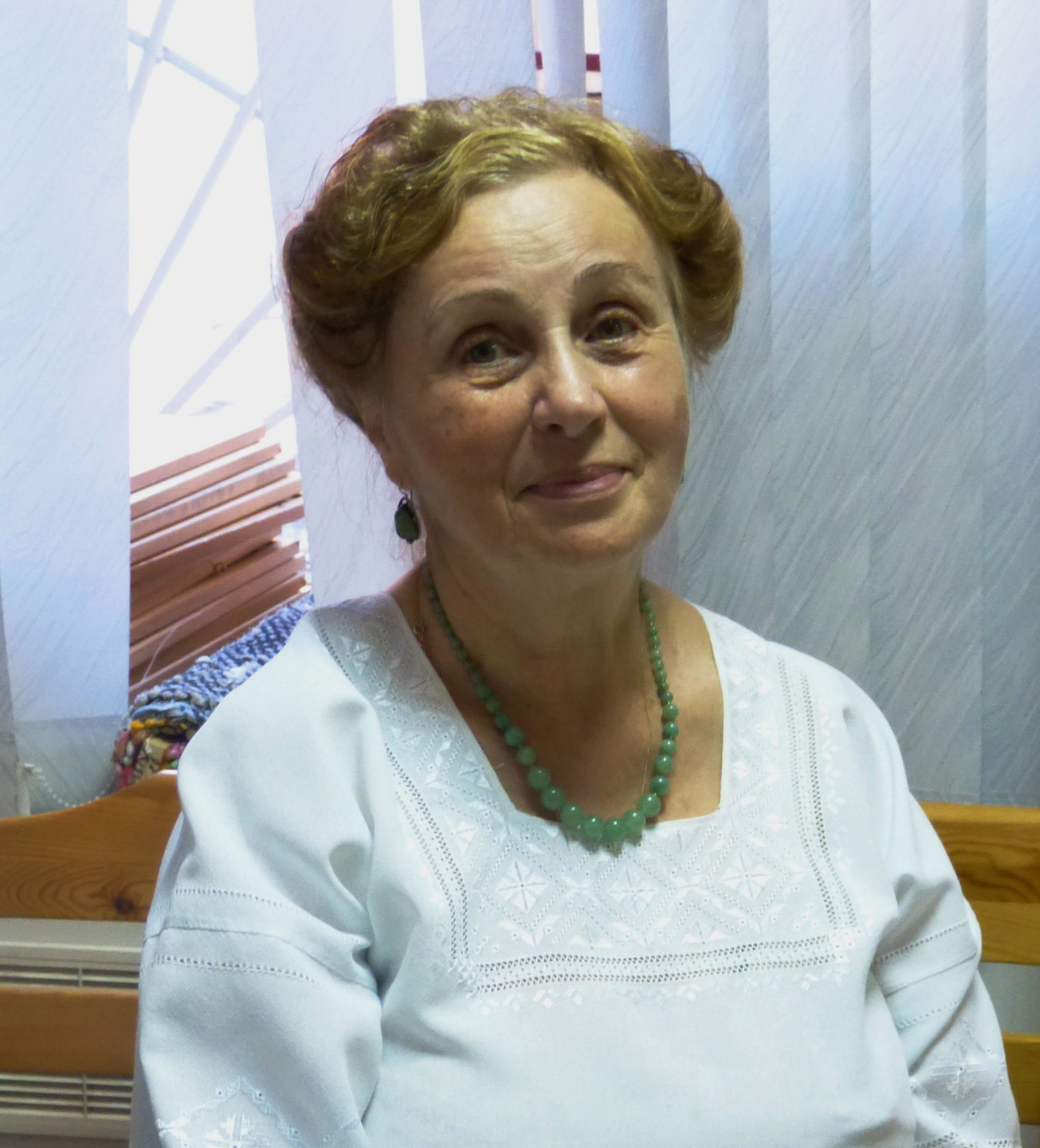 Почесний голова товариства української культури "Калина" Скрипникова Лариса Григорівна